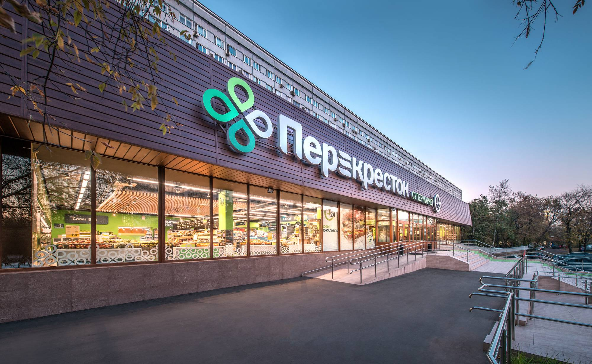 В 2014 году стартовал переход к новой концепции, которая предусматривает установку современного оборудования, более эффективную организацию торгового пространства, изменение внутреннего и наружного оформления (изменились логотип и стиль рекламы). Магазины в этой концепции открывались до конца 2019 года.